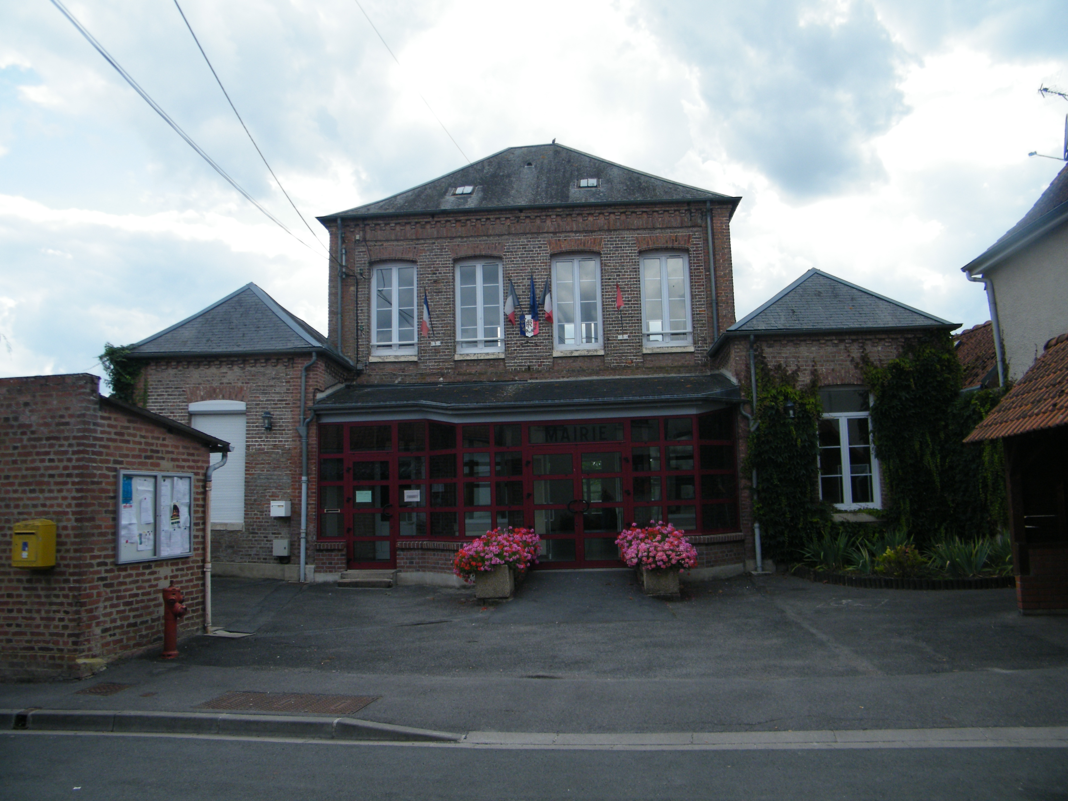 Mairie.